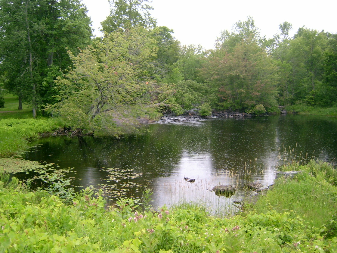 Salmon River - Ontario - Canada